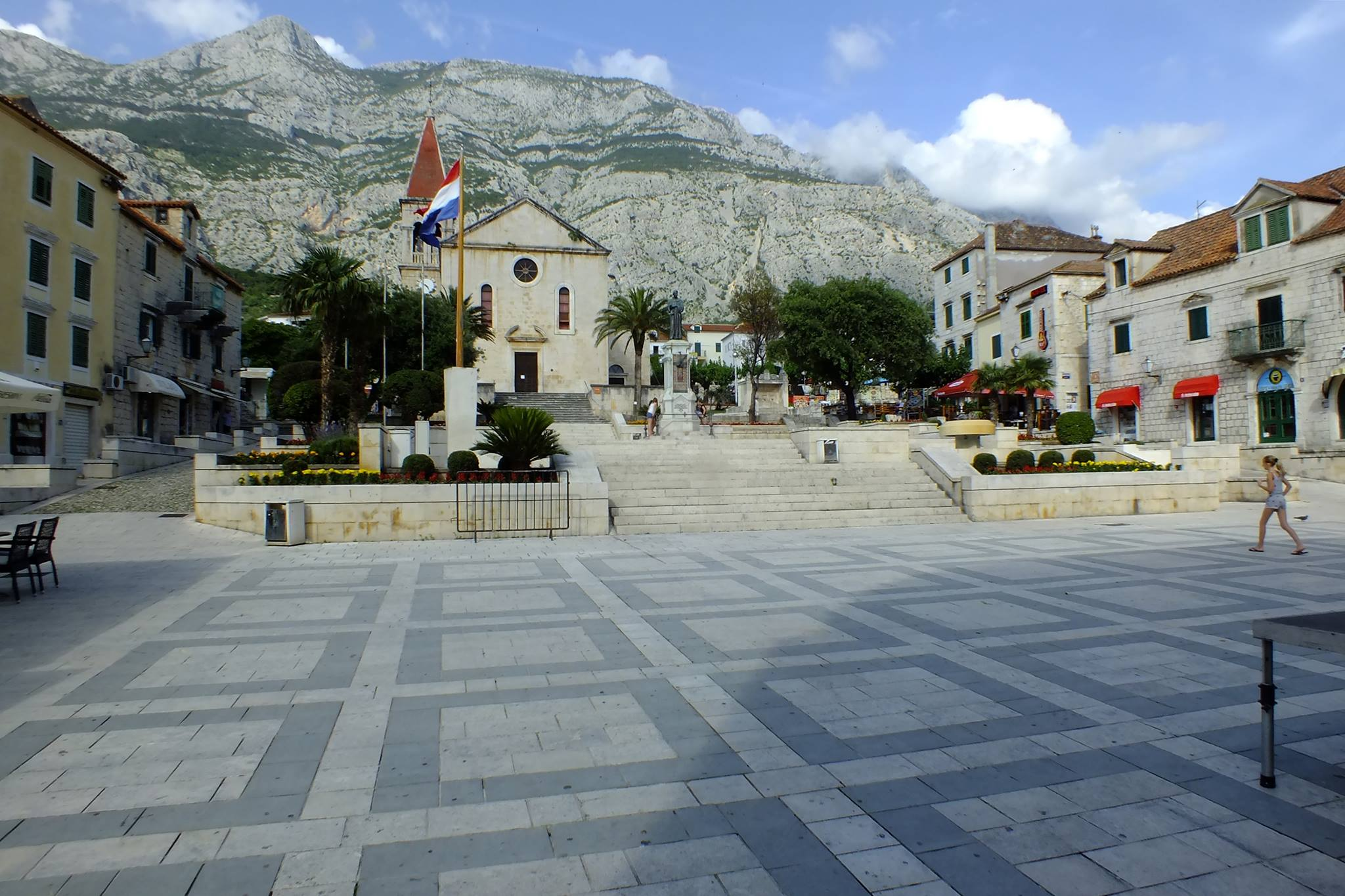 Hlavní náměstí v Makarské